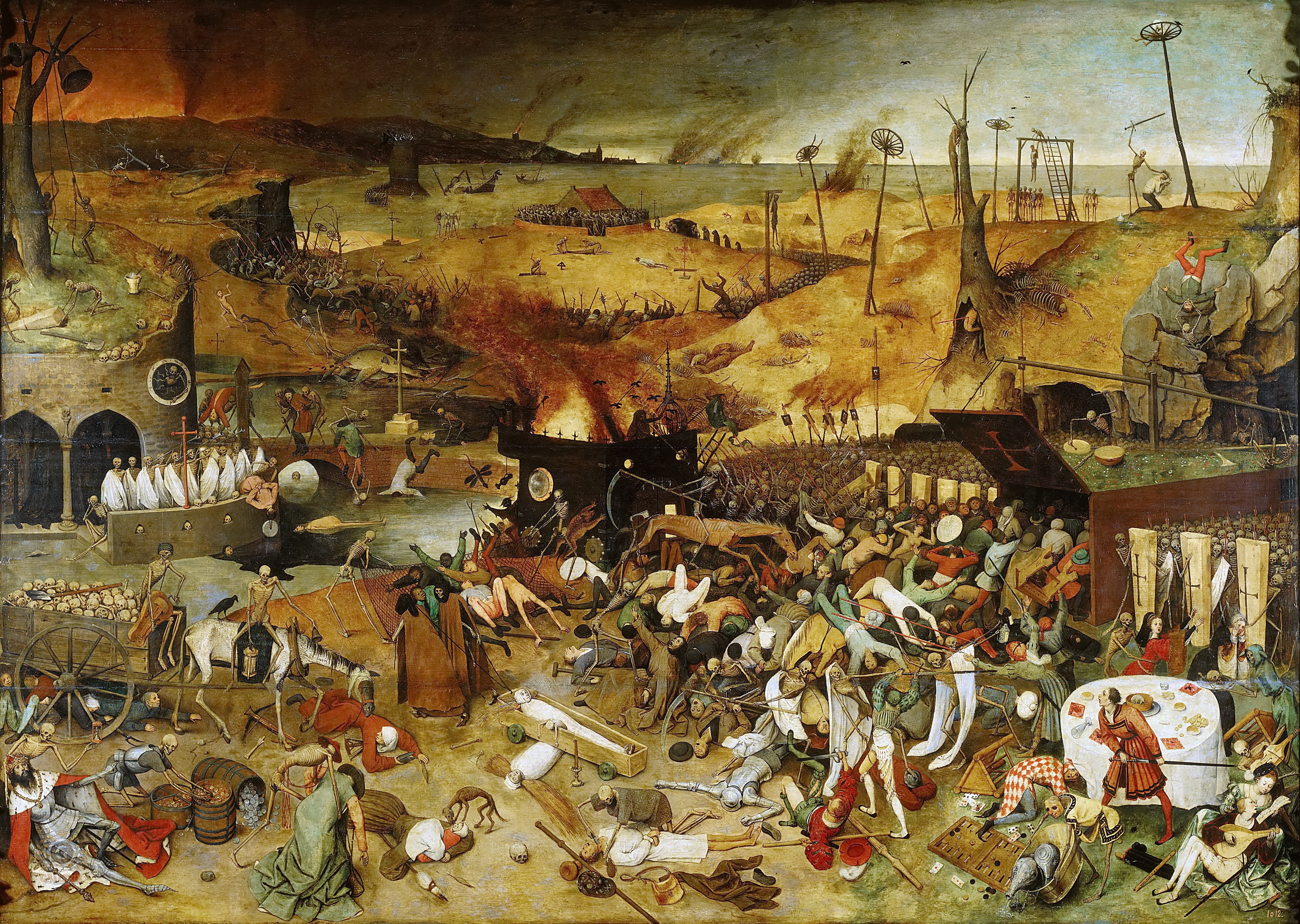 Triumf Smrti od Petra Bruegela, namalován jako reakce na morové rány v Evropě